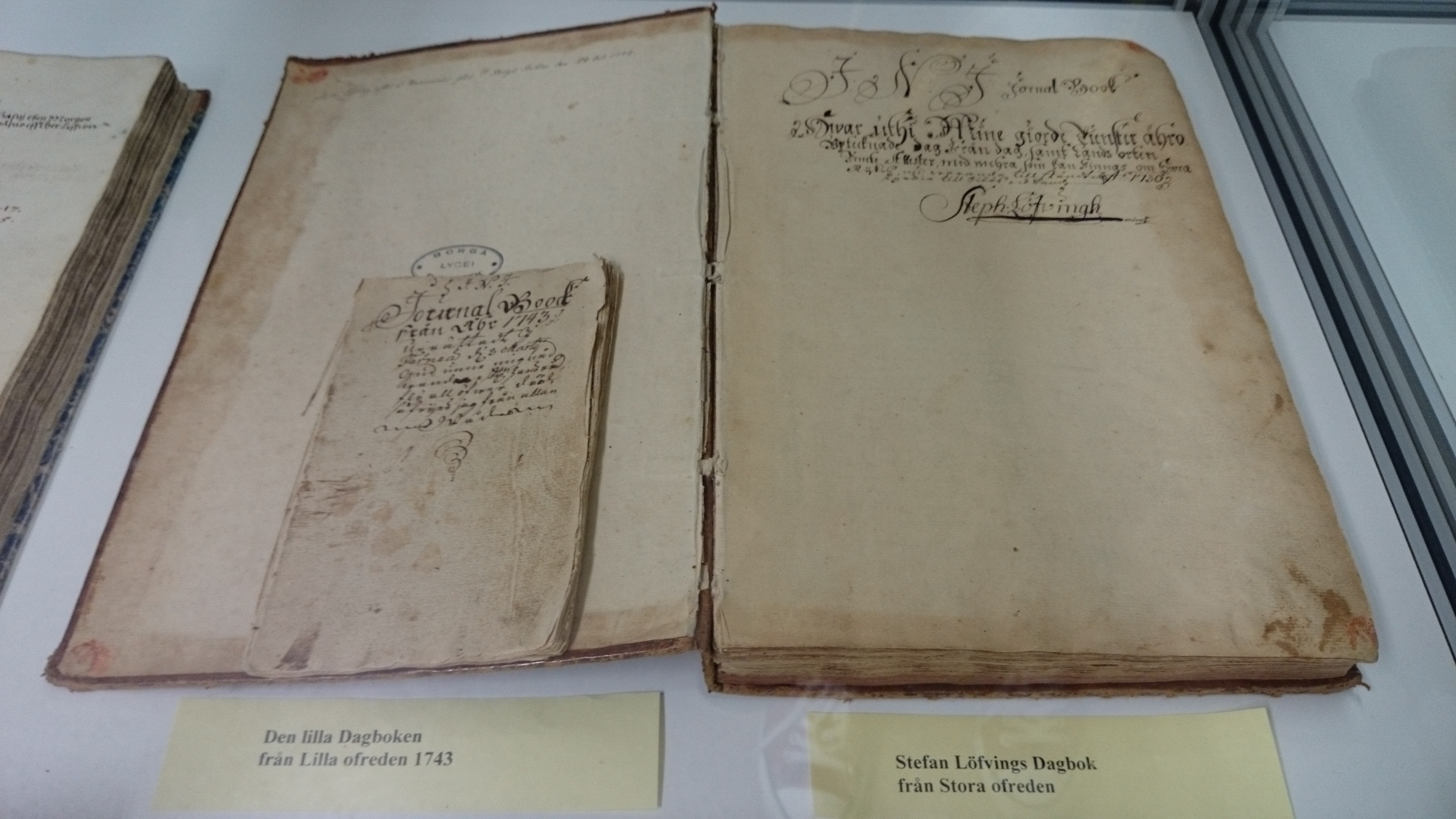 Tapani Löfvingin päiväkirjat Borgå Gymnasiumin kirjastossa.